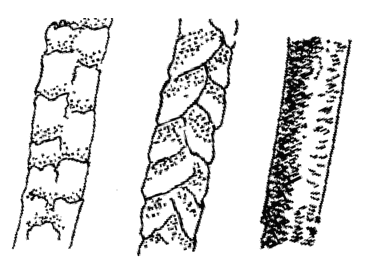 Schematische Darstellung Links: Hundehaar Mitte: Katzenhaar Rechts: Menschliches Haar